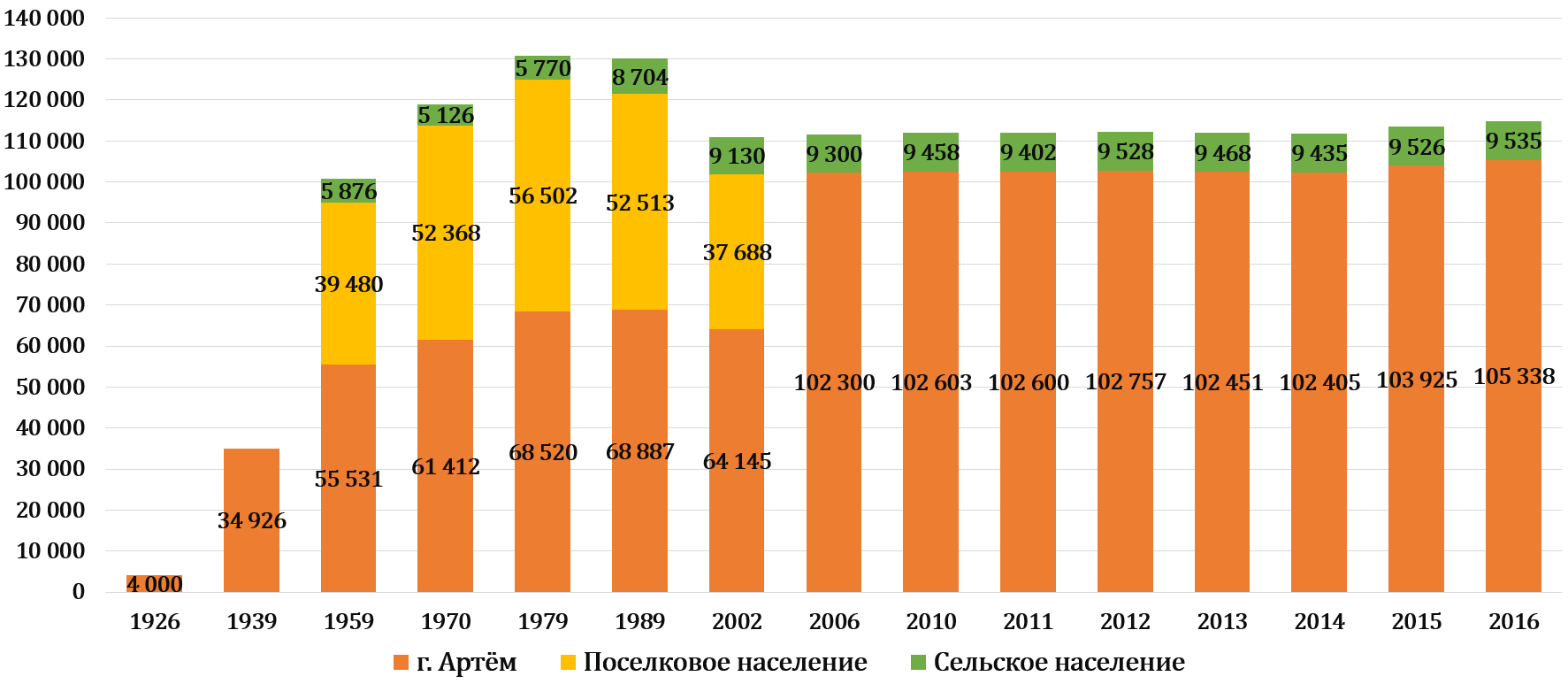 Динамика численности округа по компонентам, 1939-2016